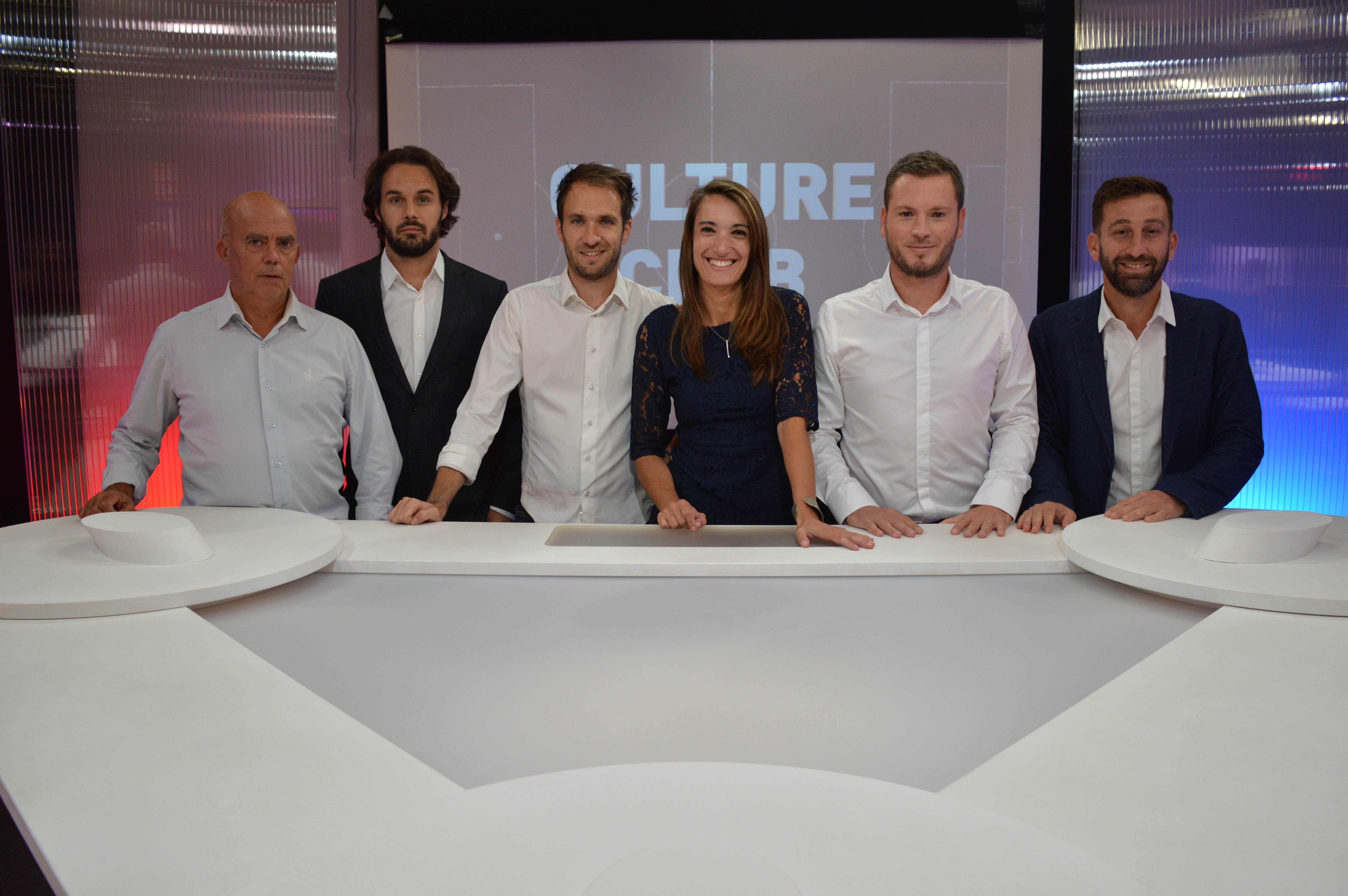 Les journalistes